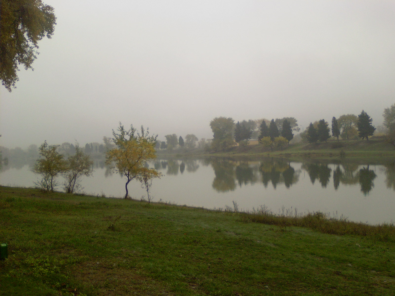 რუსთავის პარკი